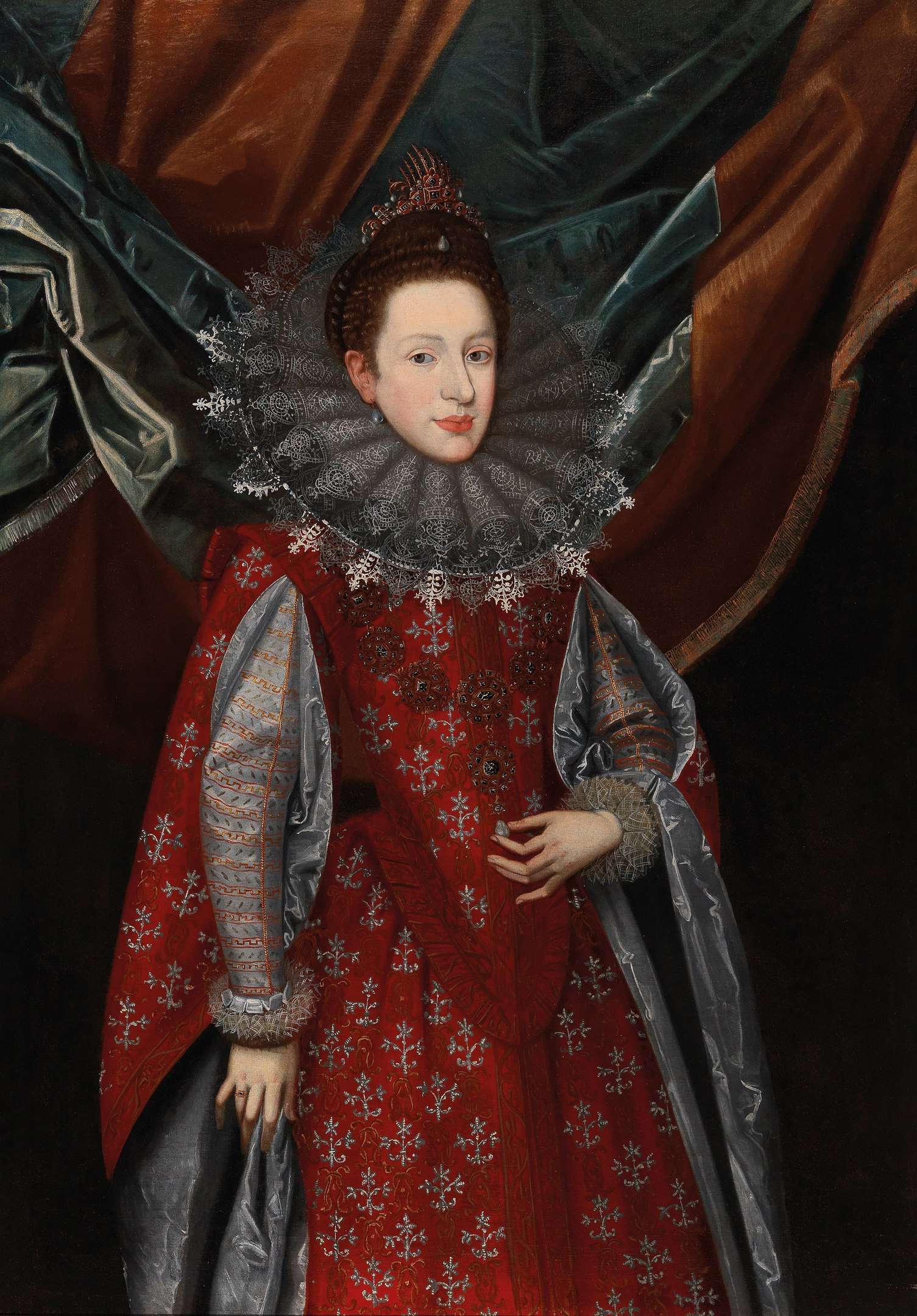 Ritratto di Margherita di Savoia, Duchessa di Mantova